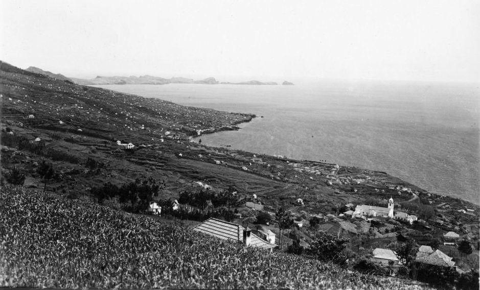 Gaula. Em primeiro plano a igreja de Gaula e, em segundo plano, a Ponta da Queimada e a Ponta de São Lourenço Fotografia Perestrellos Photographos, 1940 (c.) Photographia Museu Vicentes. Gaula, ilha da Madeira.